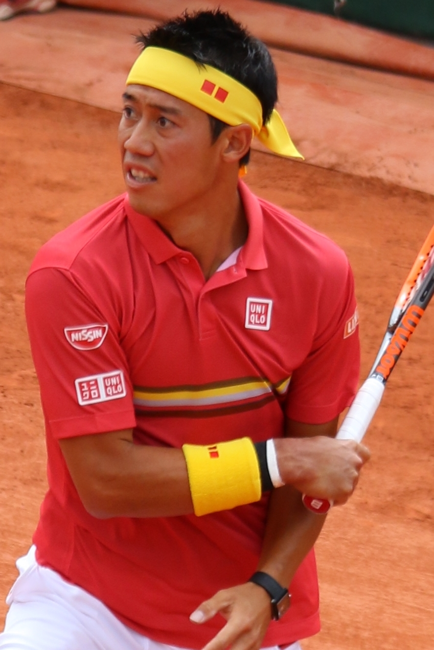 Nishikori RG18 (56)